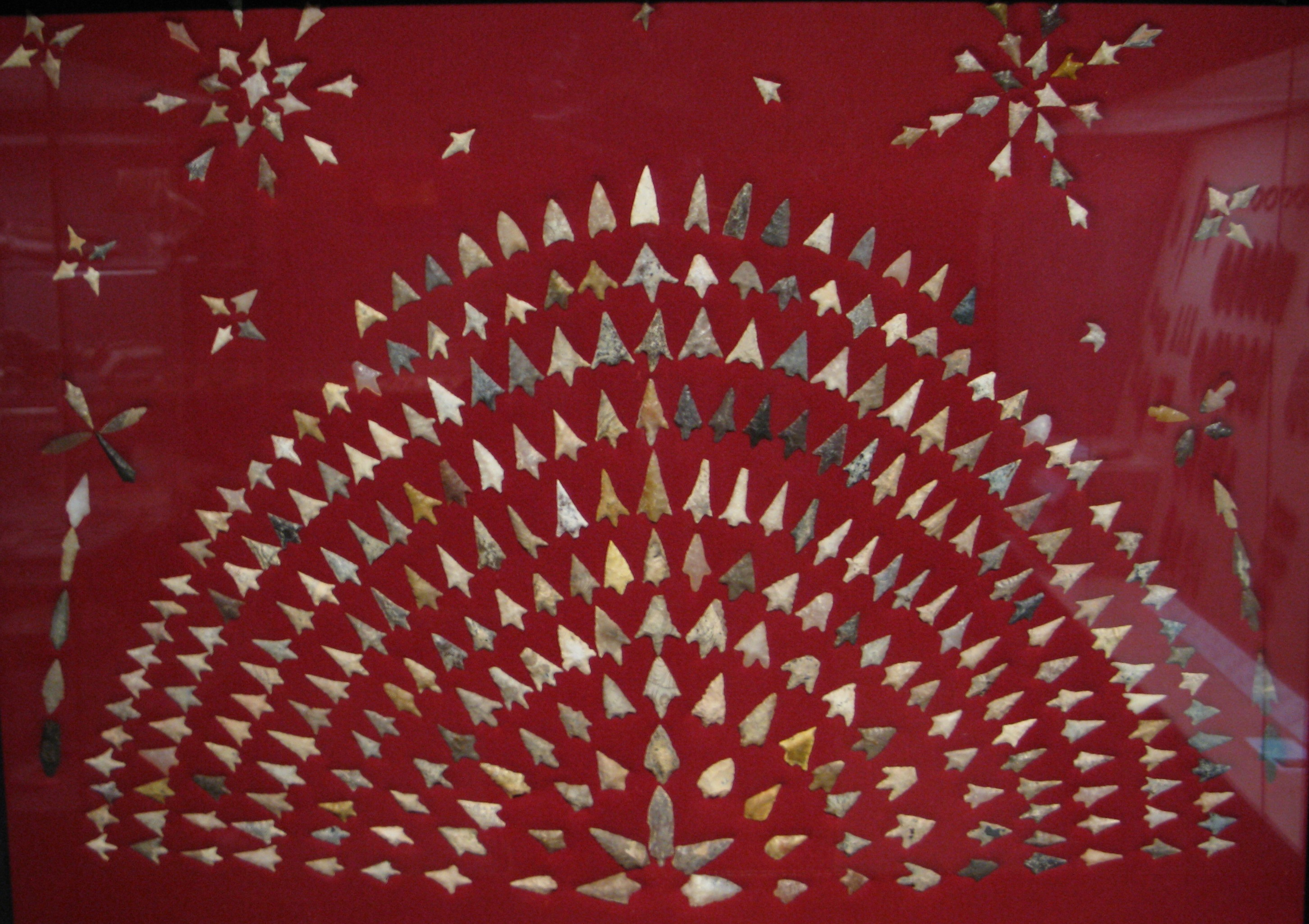 Pointes de flèches sahariennes, du désert de Ouargla. Présentation réalisée par Pierre Pernot.